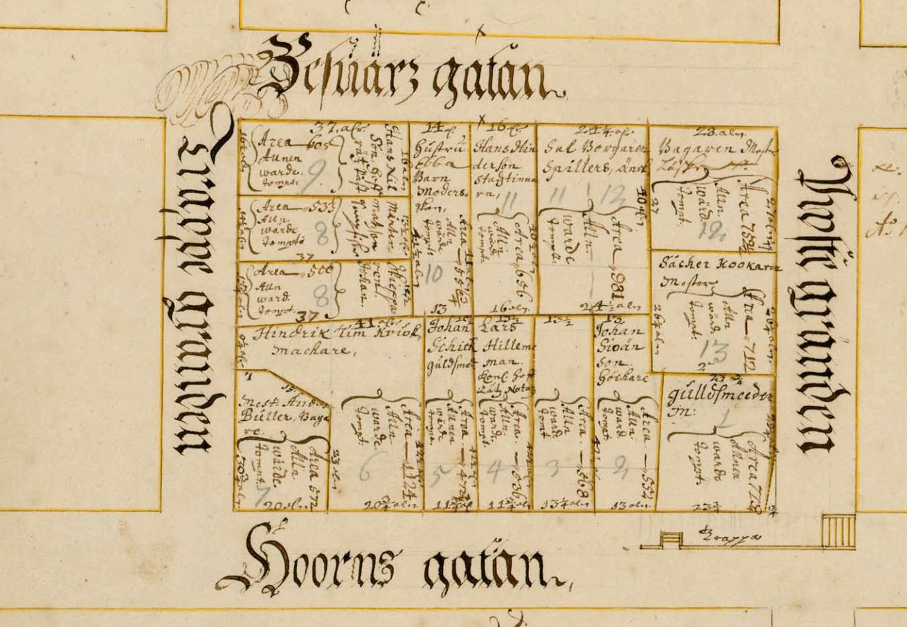 Kvarteret Bocken (nuvarande Stenbocken) i Holms tomtbok